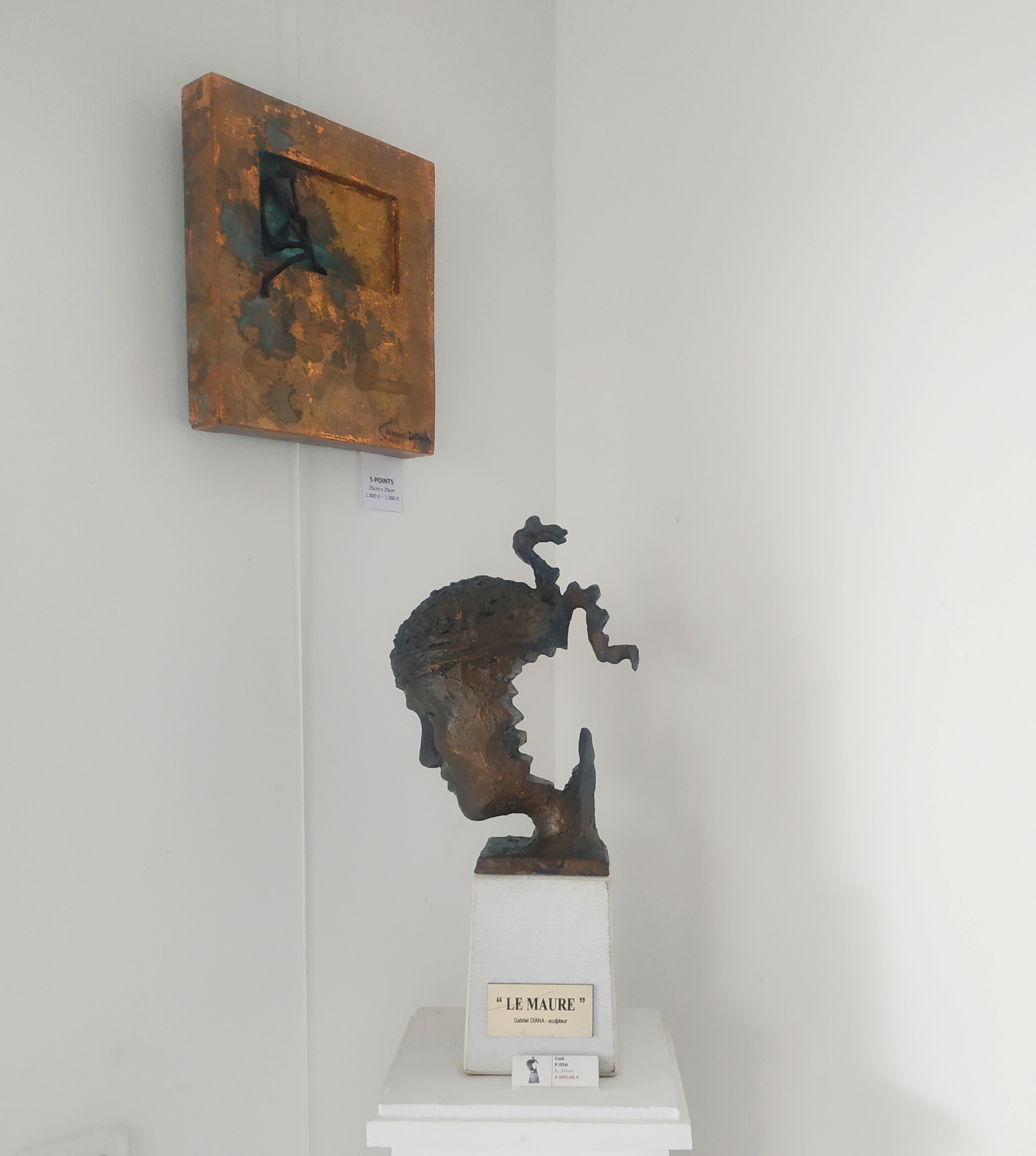 Автор фото я, Ильмира Контини (Франция)